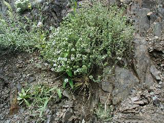 Thymus vulgaris